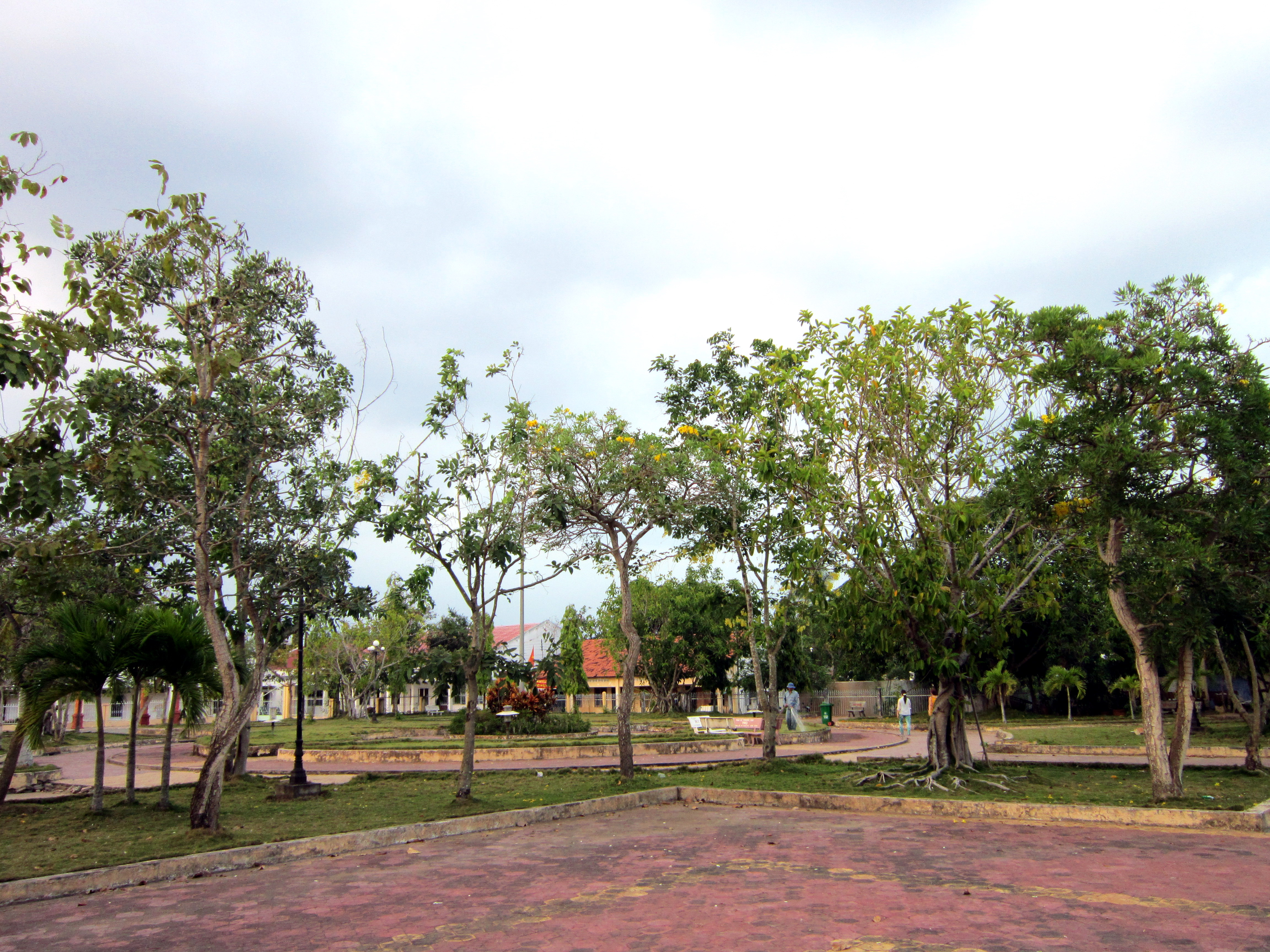 Công viên Long Hồ tại thị trấn Long Hồ, huyện Long Hồ, tỉnh Vĩnh Long (Việt Nam